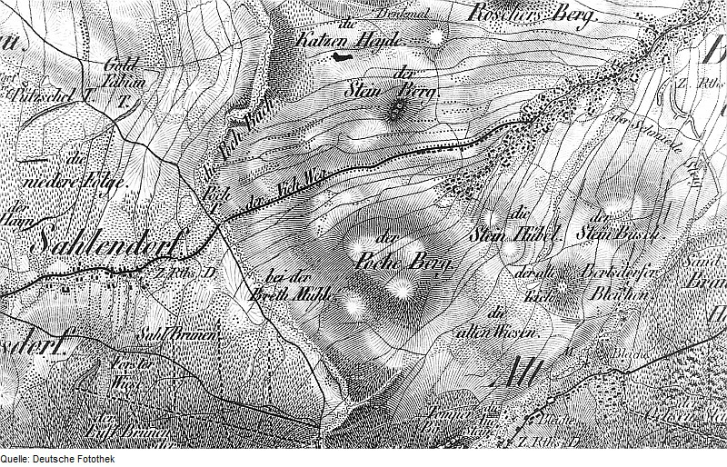 Original image description from the Deutsche Fotothek Bertsdorf-Hörnitz-Bertsdorf. Oberreit, Sect. Zittau, 1844/46